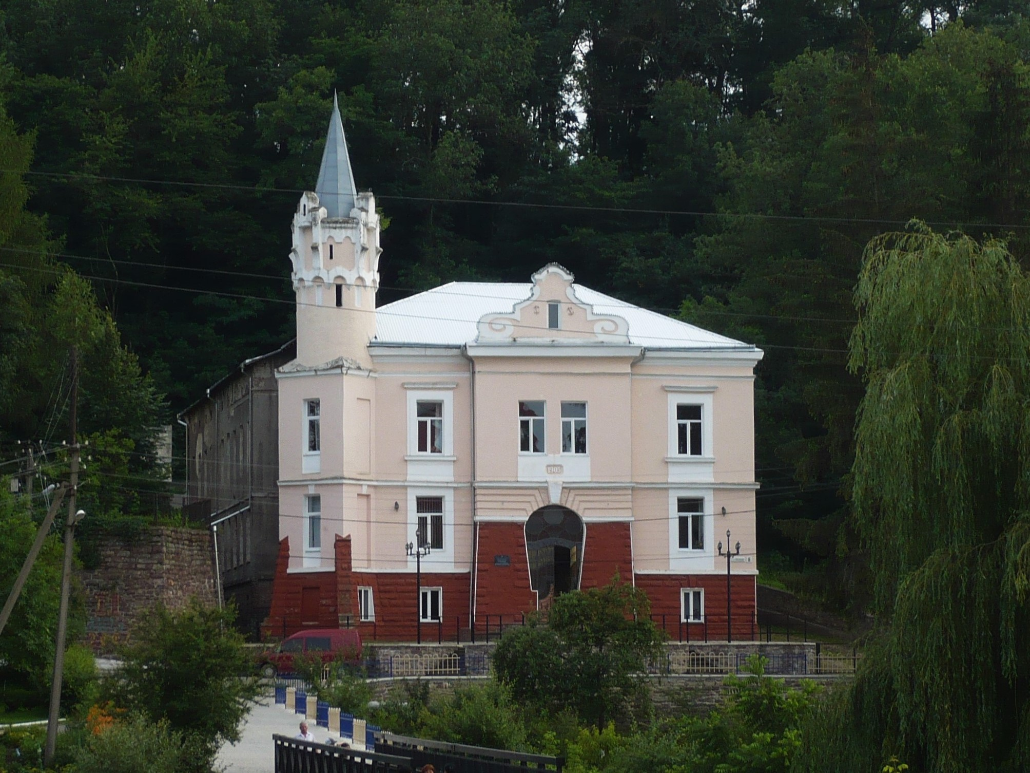 Buczacz.Sokół